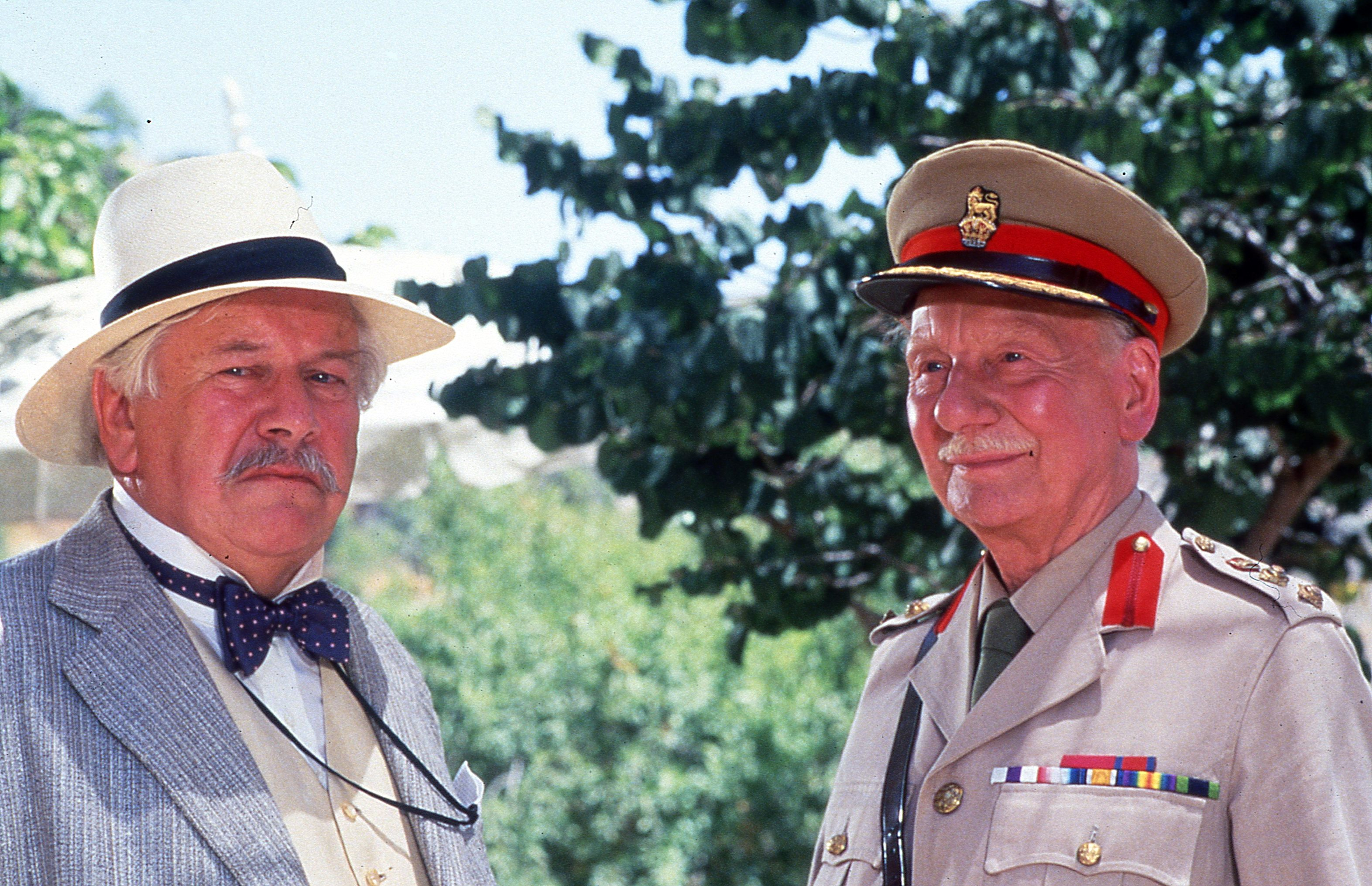 פיטר יוסטינוב וסר ג׳ון גילגוד בסרט מפגש עם המוות